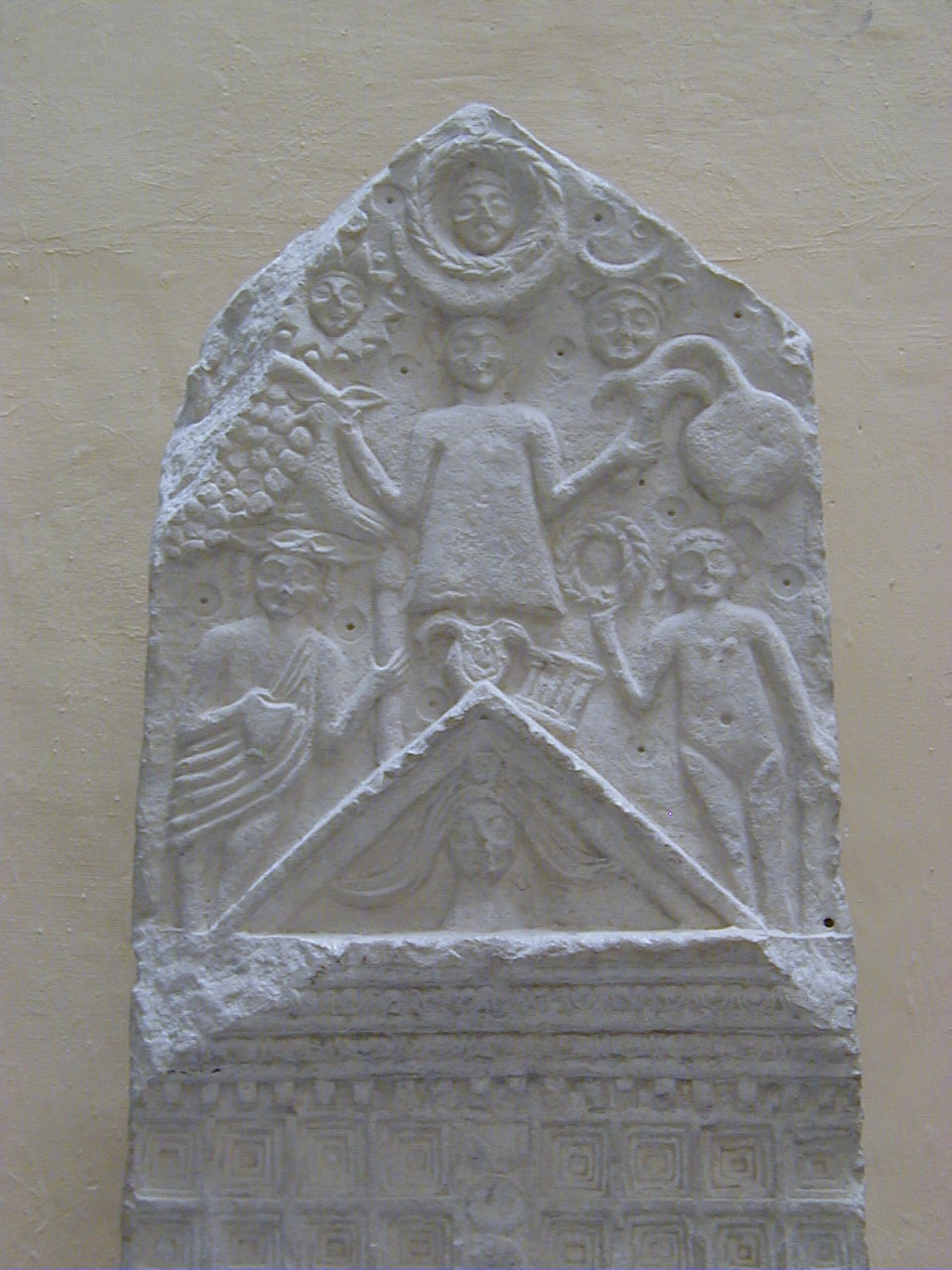 Registre supérieur d'une des stèles dites de La Ghorfa